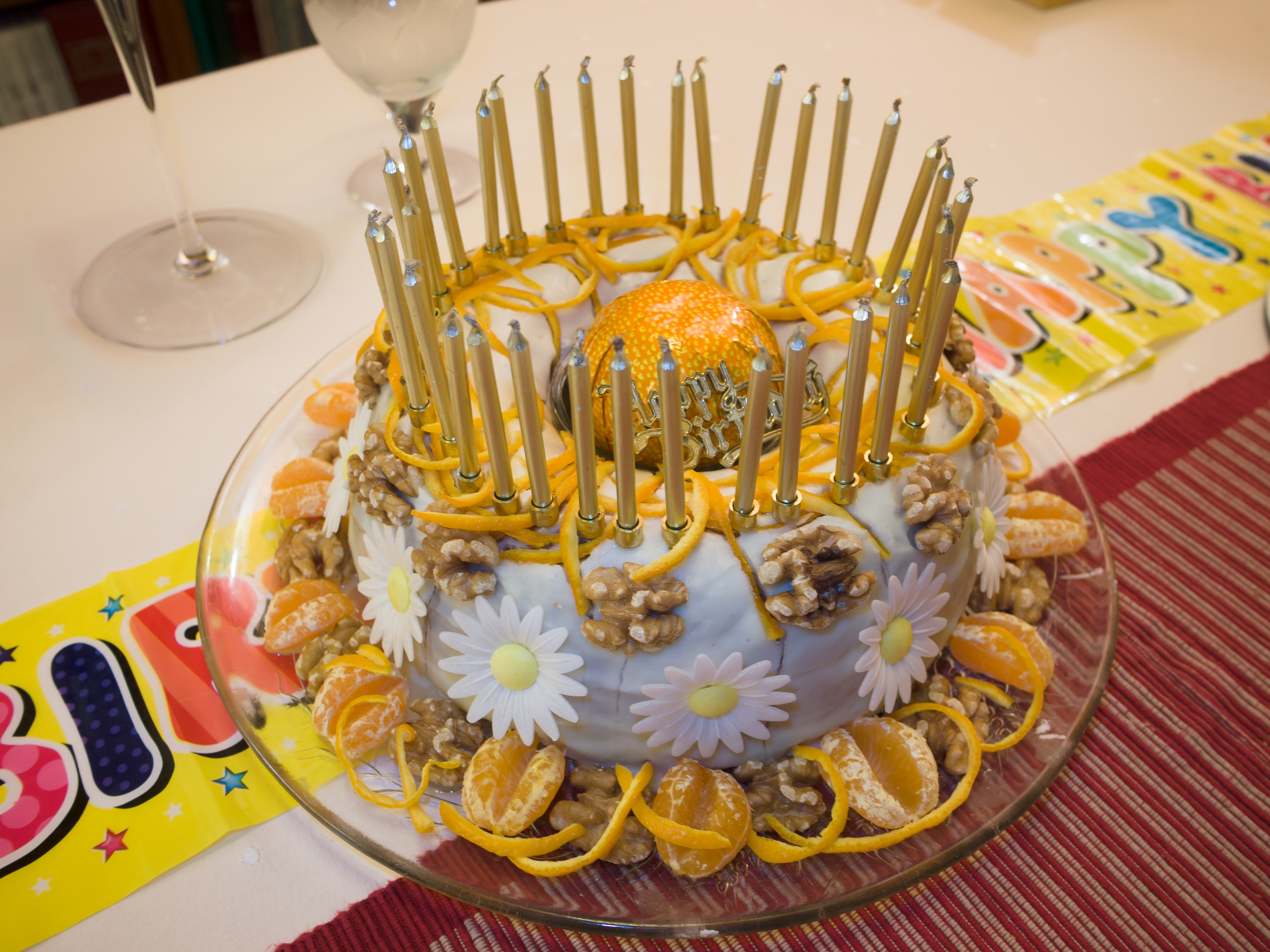 Birthday cake